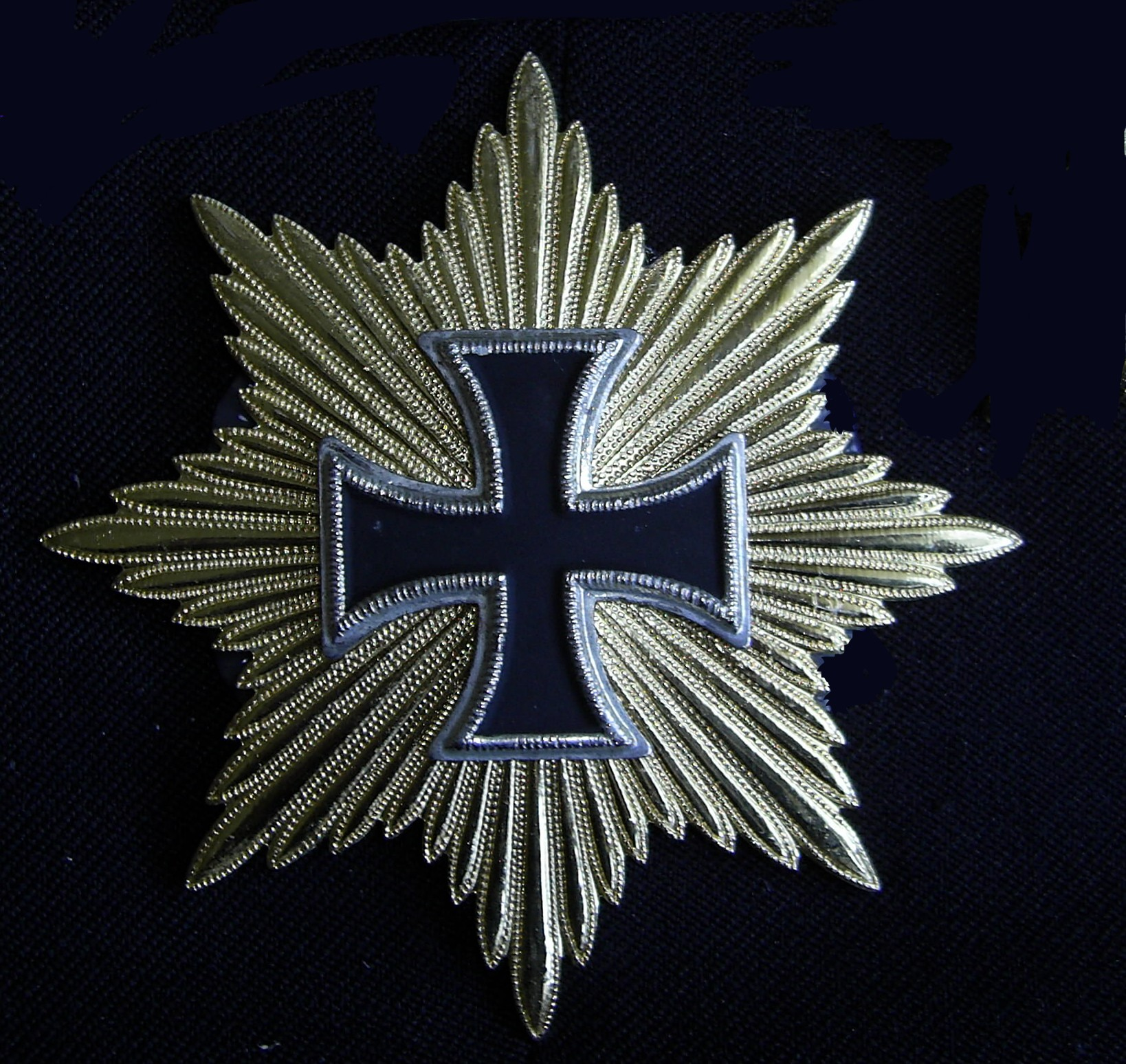 Blücherstern